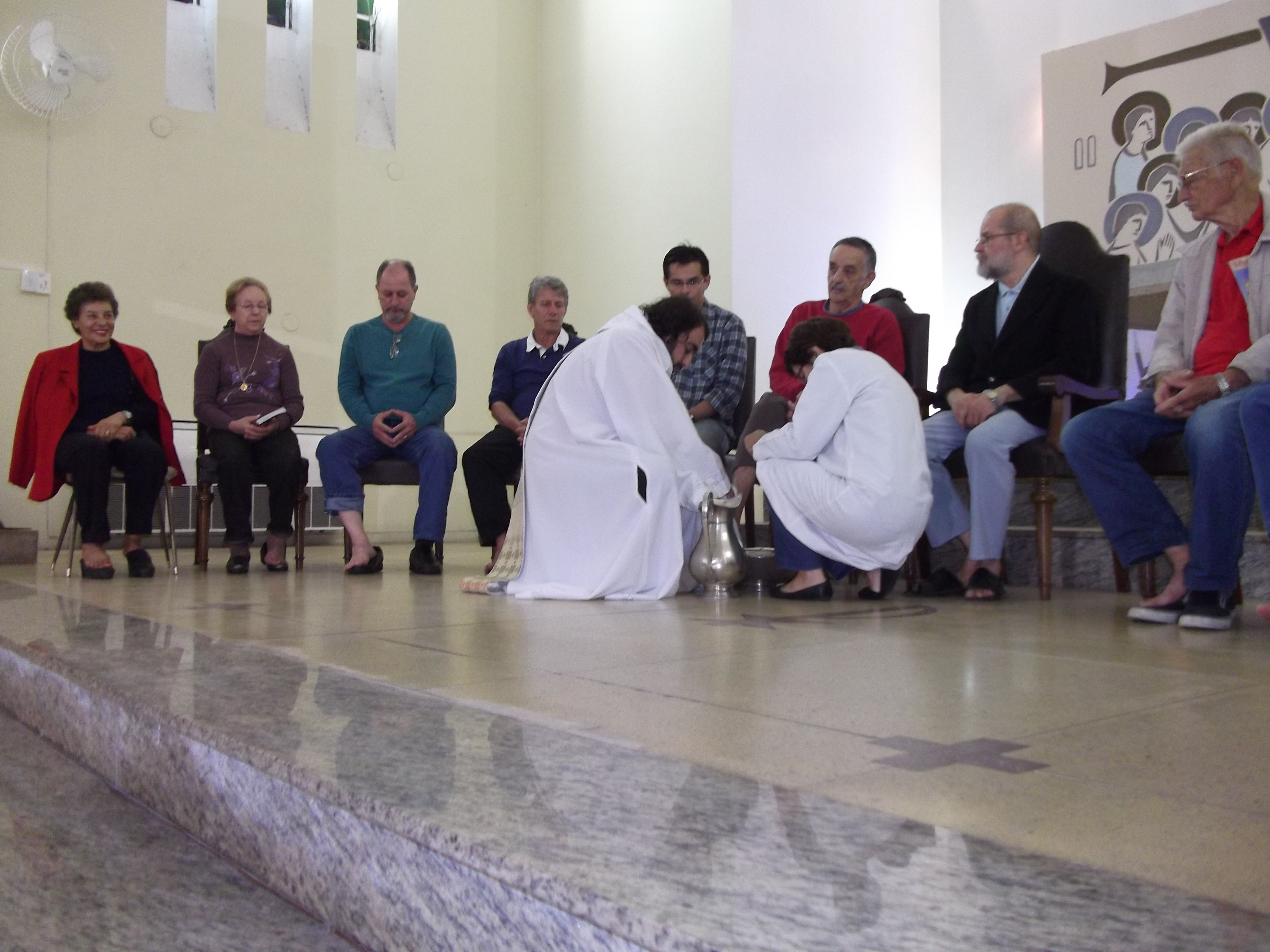 Igreja São Francisco de Assis (Porto Alegre, Brasil) : Lavapés de homens e mulheres : 2012